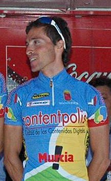 Manuel Calvente. Contentpolis-Murcia, Euskal Bizikleta 2008